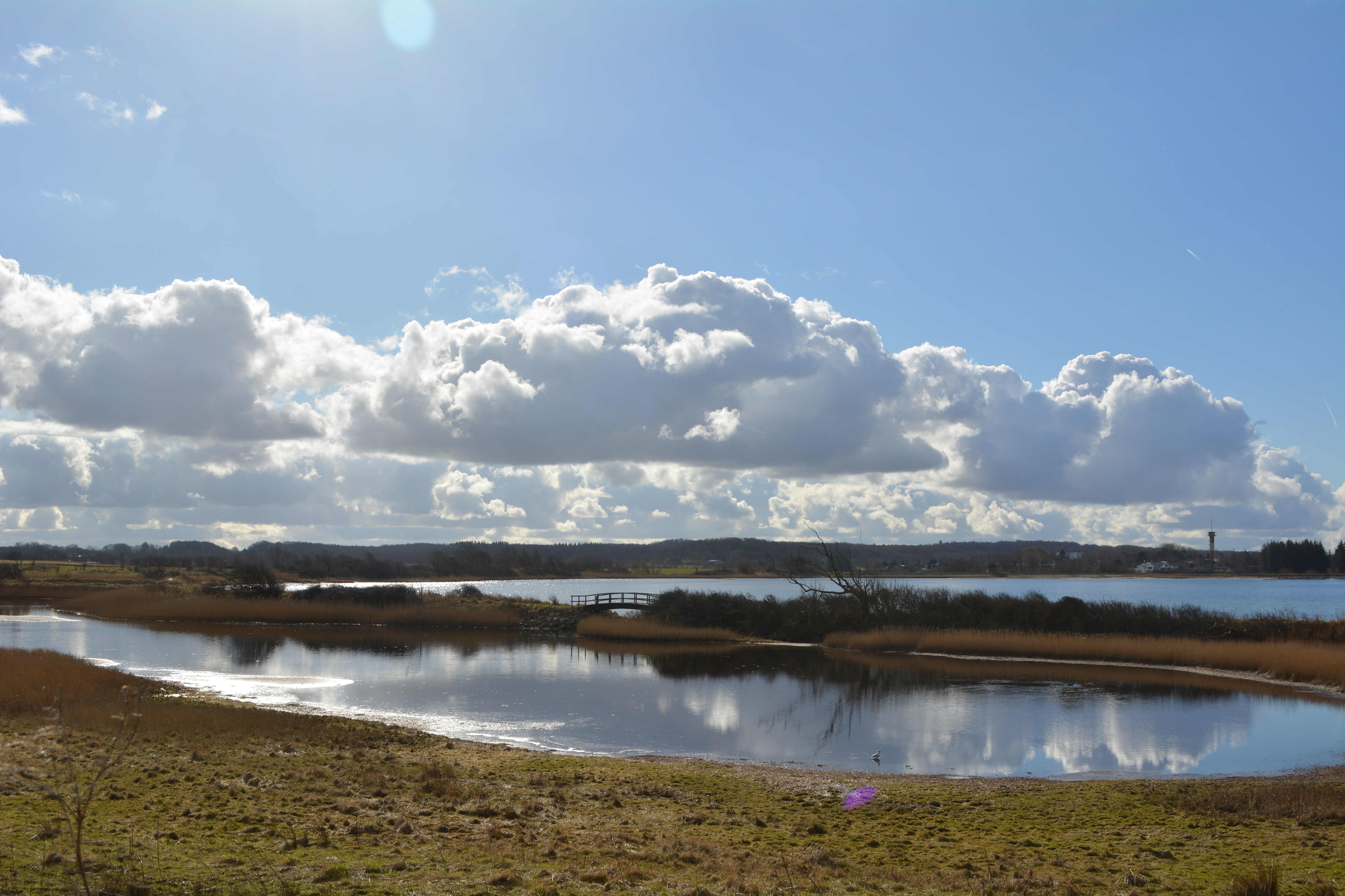 Im Vordergrund sieht man das Kleine Noor, das 2002 wiedervernässt wurde. Zahlreiche Vogel-und Pflanzenarten haben sich dort angesiedelt. Im Hintergrund liegt die Flensburger Förde mit Blick auf die dänische Küste.